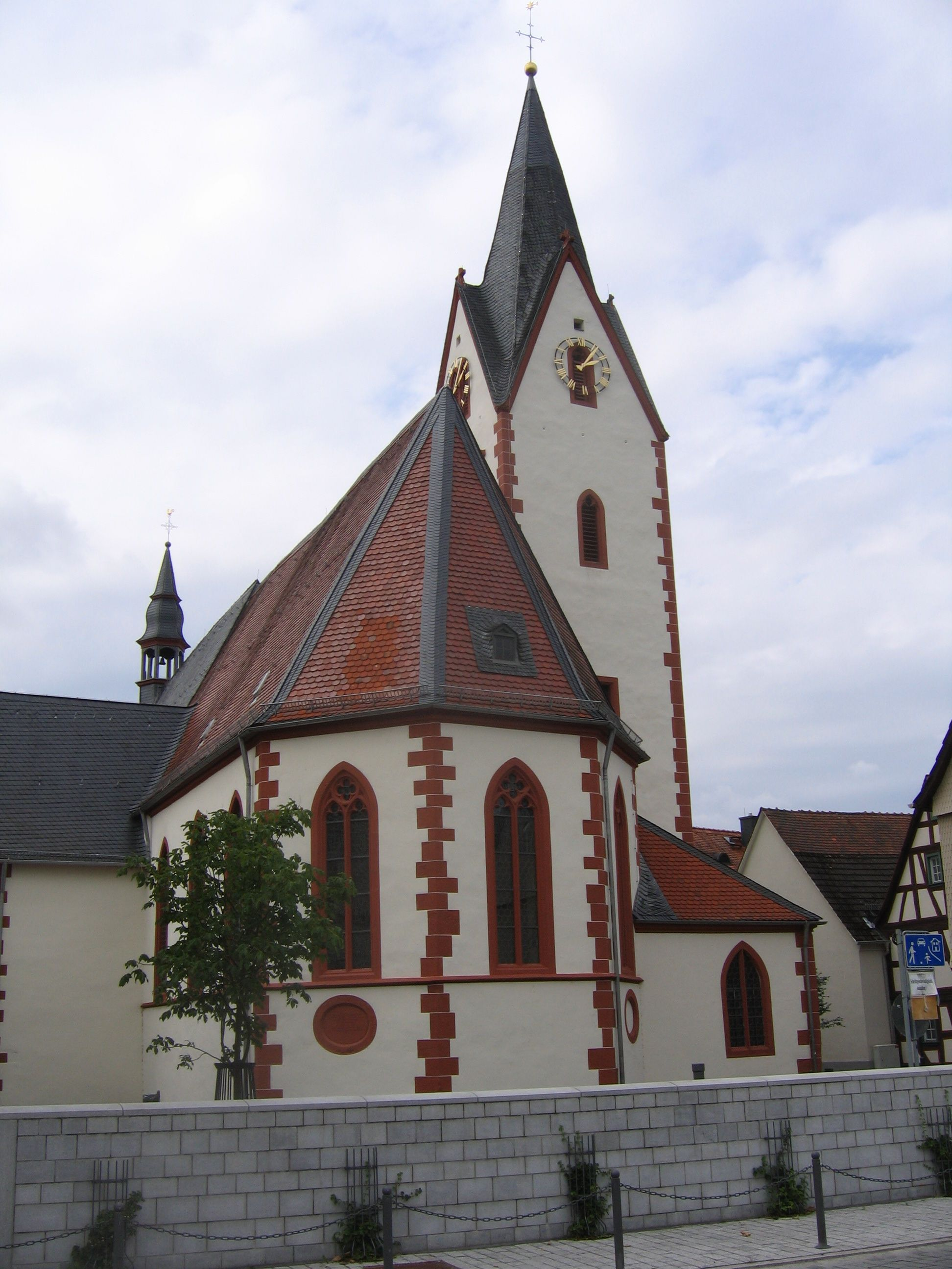 Stadtkirche Babenhausen